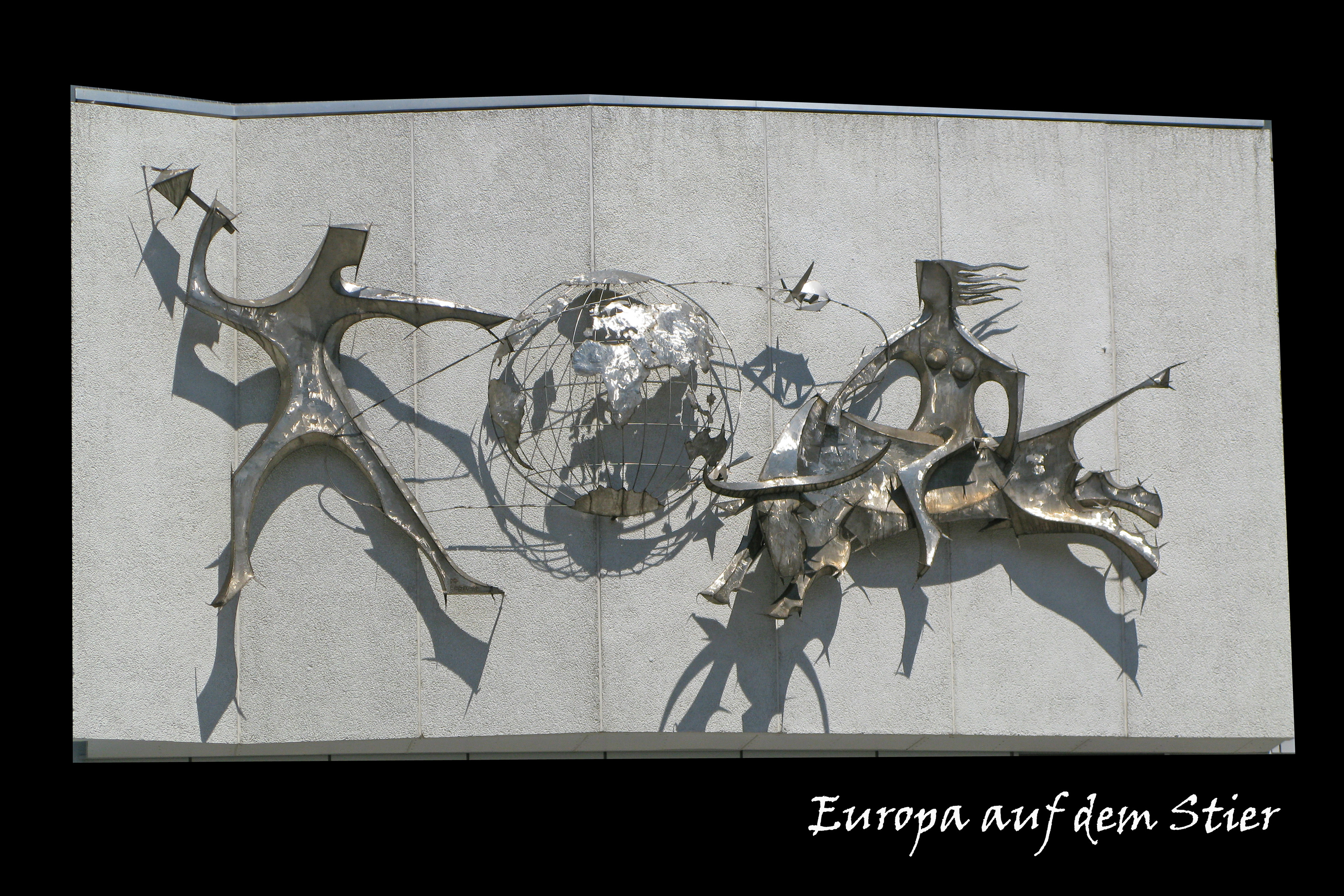 Europa auf dem Stier, Dortmund, Fred G. Hellwig